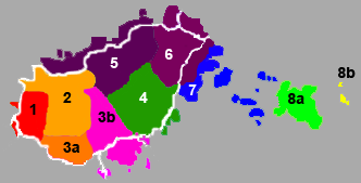 Ungarische Dialekte mit Berücksichtigung der verschiedenen möglichen Einteilungen